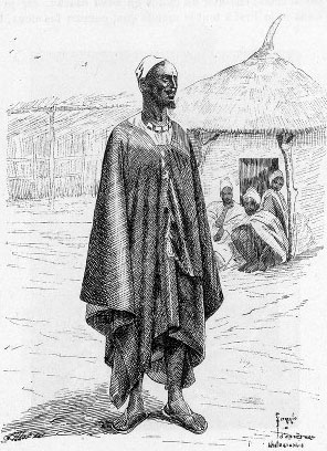 Un griot du roi du Boundou (illustration de Côte occidentale d'Afrique du Colonel Frey) - Fig.85 p.132 [Cote : Réserve A 200 386]